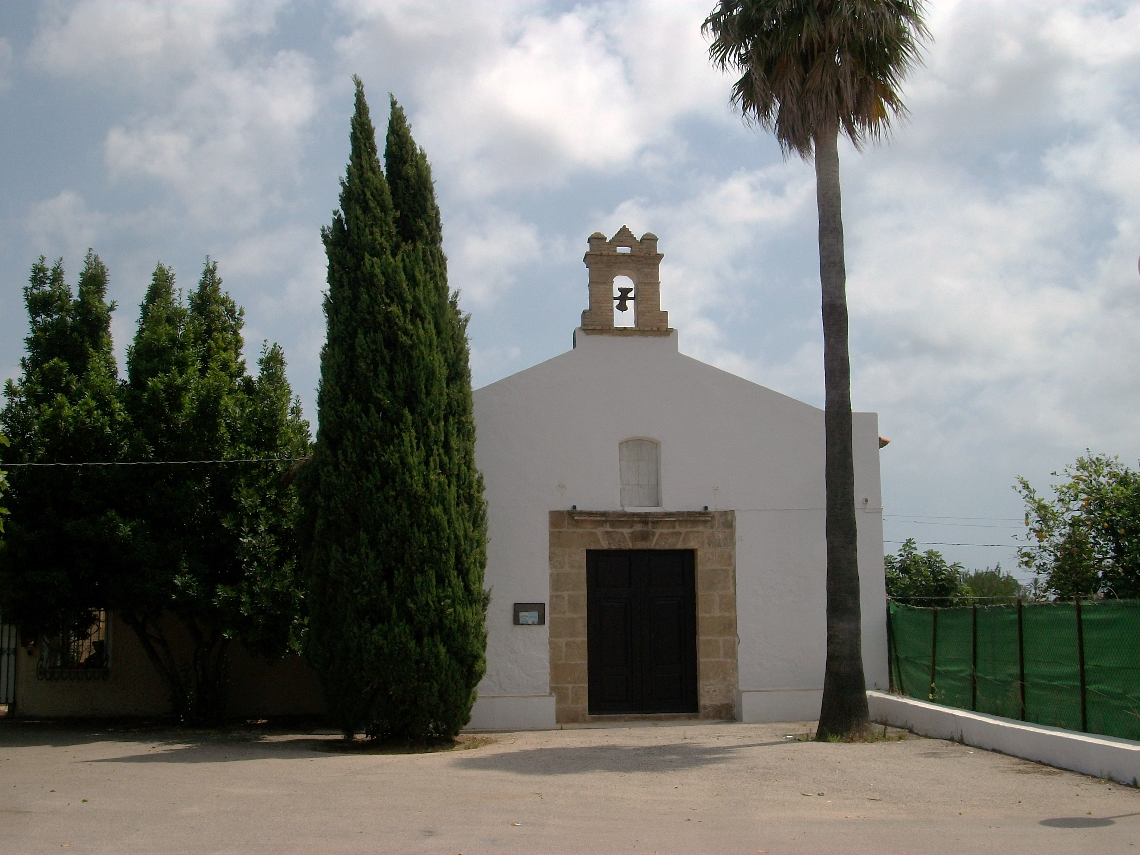 Ermita de Santa Paula, Dénia, Marina Alta, País Valencià.